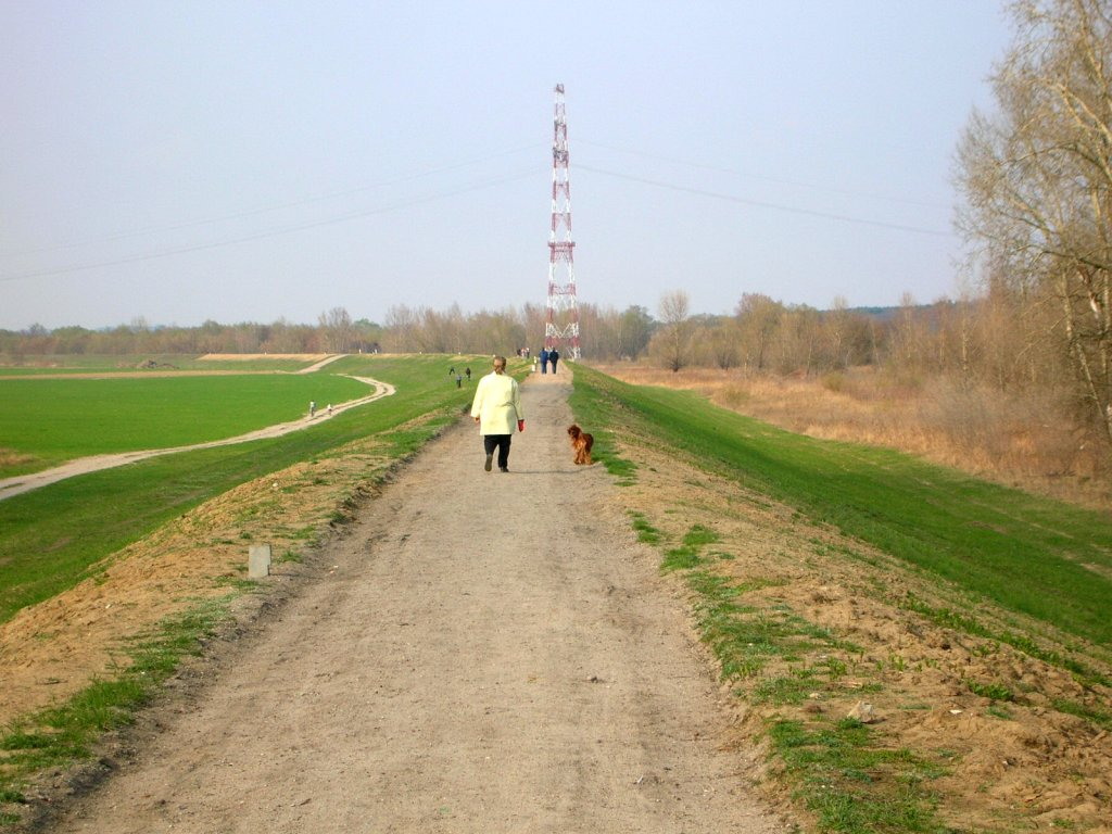 Ścieżka spacerowa nad Wisłą na wale przeciwpowodziowym w Bydgoszczy-Fordonie